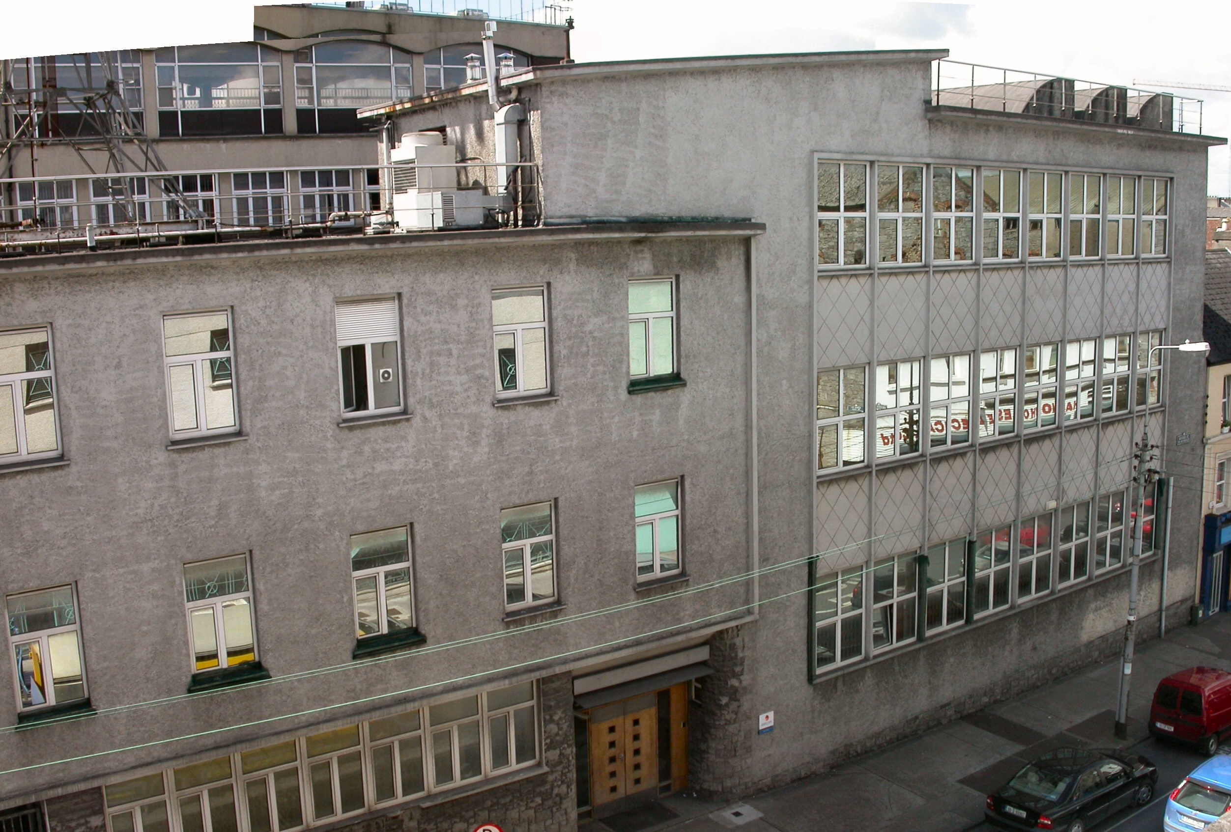 Malartan telefon Luimnigh